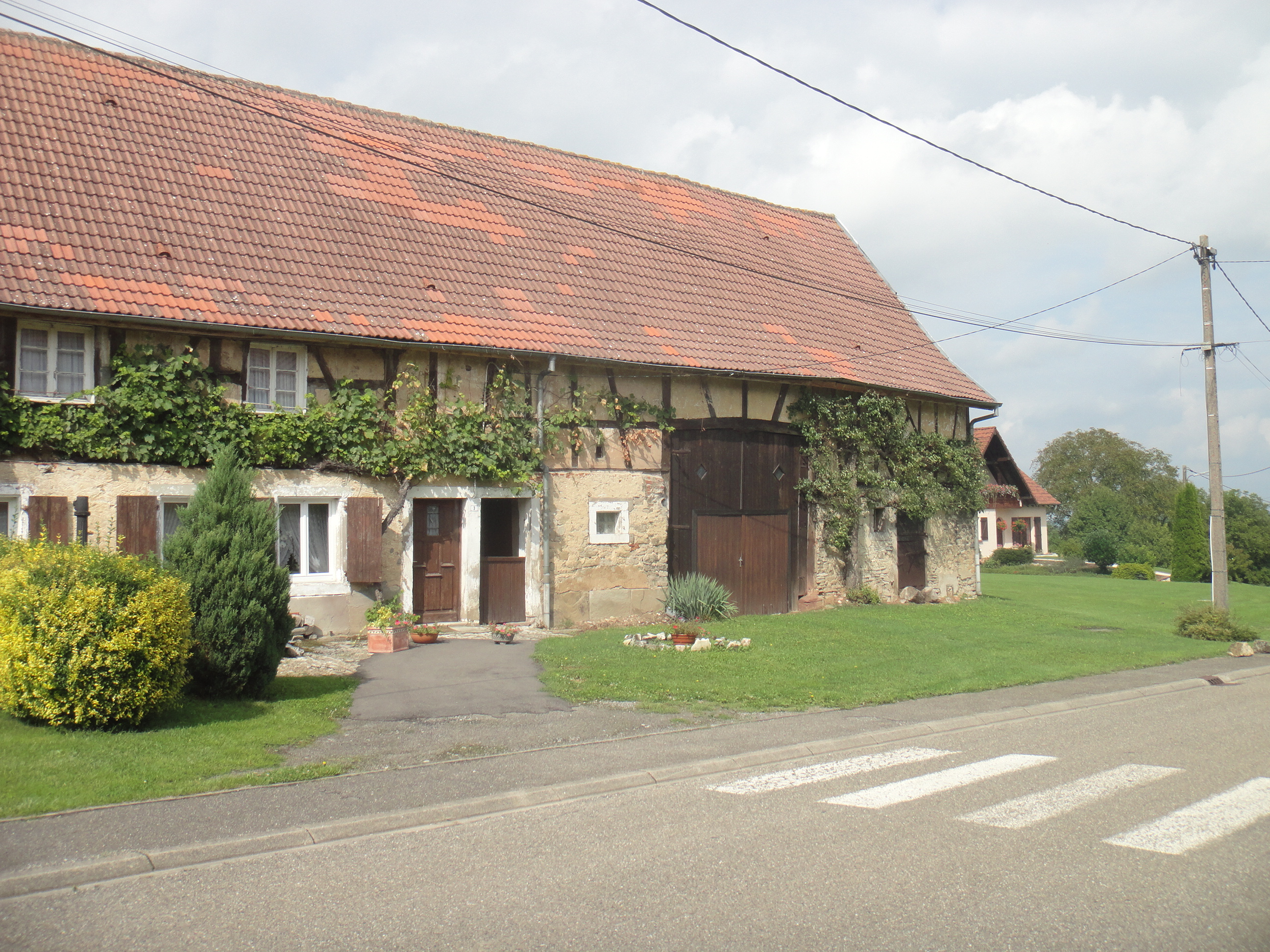 Ferme à pans de bois située à Vittersbourg (Moselle, France) construite au XVIIIe siècle et remaniée en 1826. Inscrite aux monuments historiques en 1992